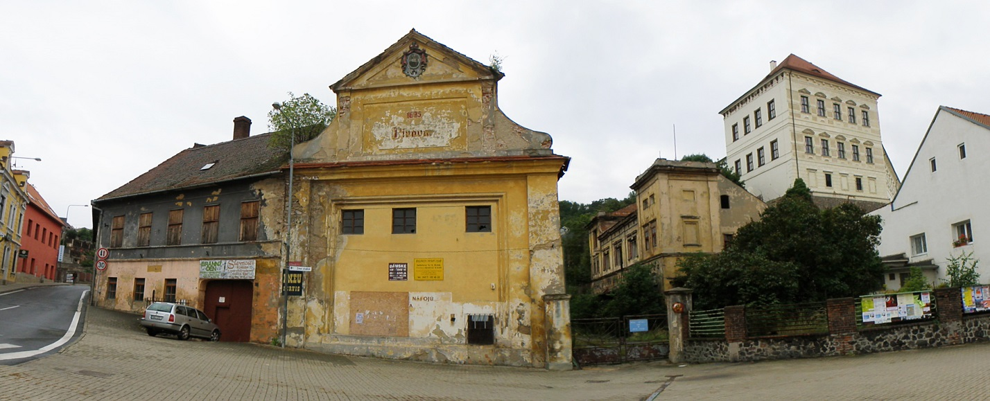 Pivovar, s omezením: bez provozního objektu bez čp na parc. č. 783 (Bílina), Litoměřická, Teplická 2, Bílina